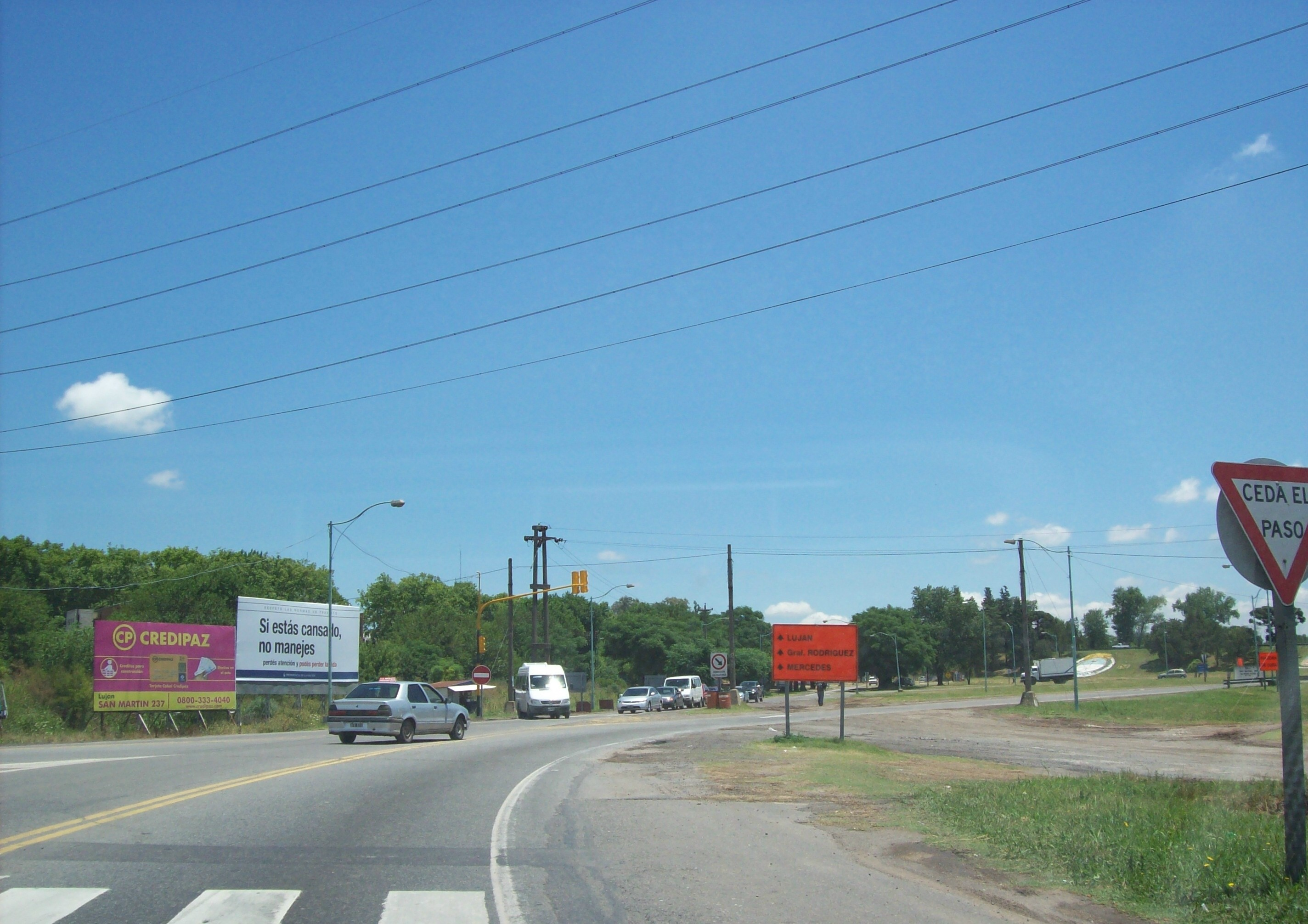 Intersección de la Ruta Nacional 5 con la Ruta Provincial 7 en Luján, Provincia de Buenos Aires, Argentina.